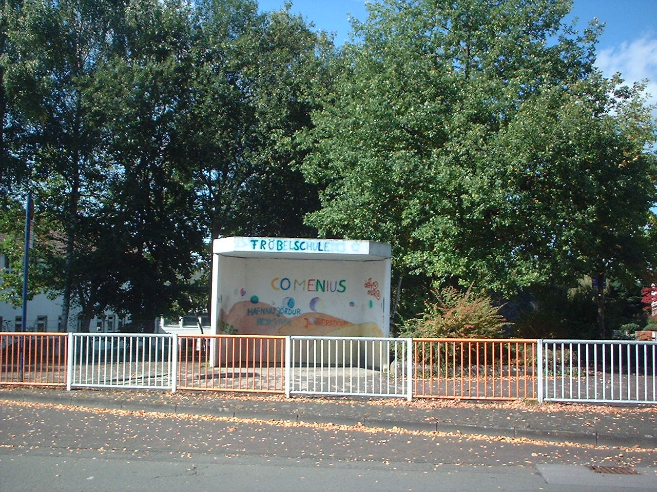 Bushaltestelle an der Fröbelschule zur Schulpartnerschaft "Comenius" in Arnsberg.